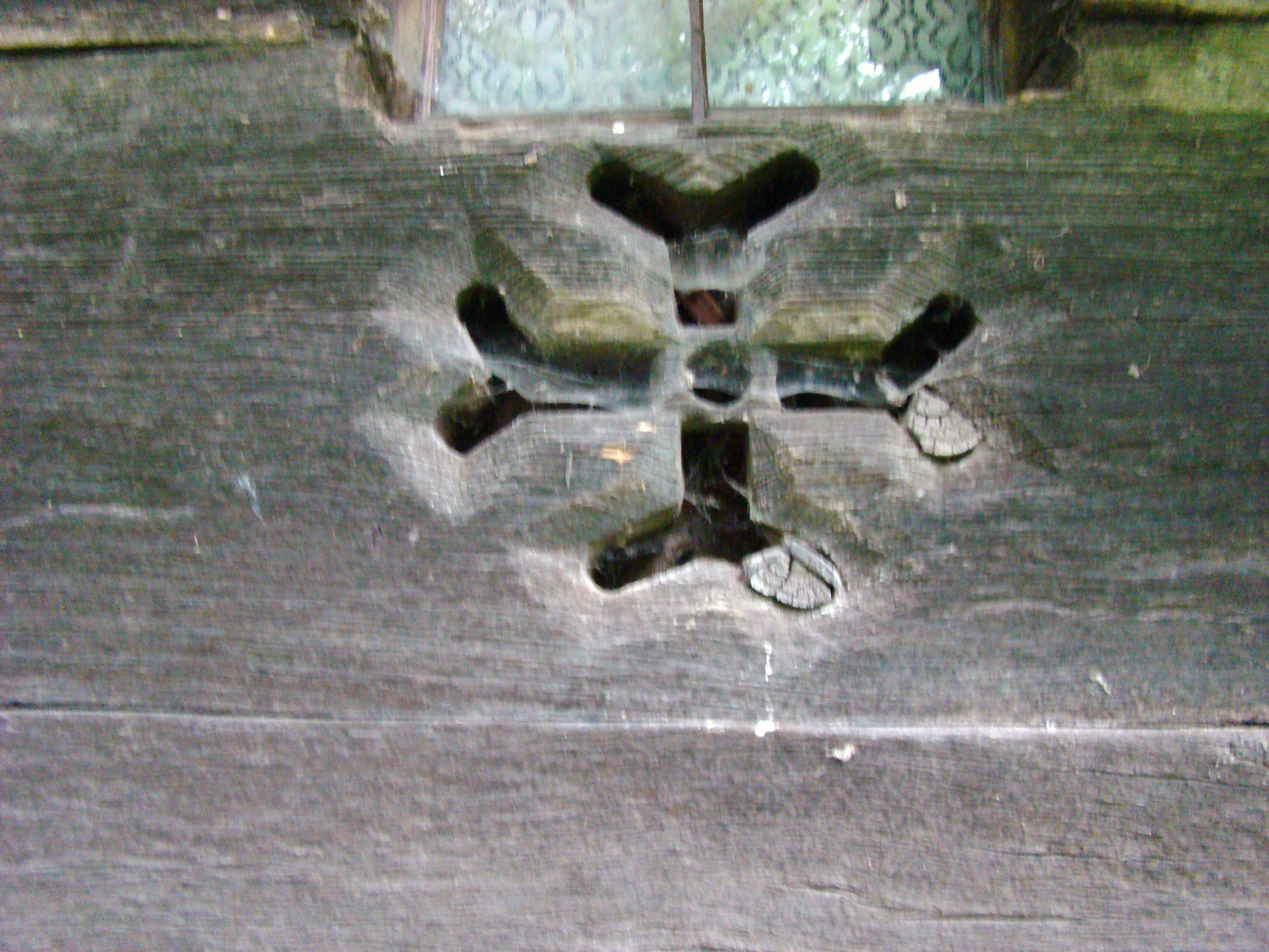 Biserica Sfinţii Arhangheli, Sat Brusturi, Comuna Creaca, județul Sălaj